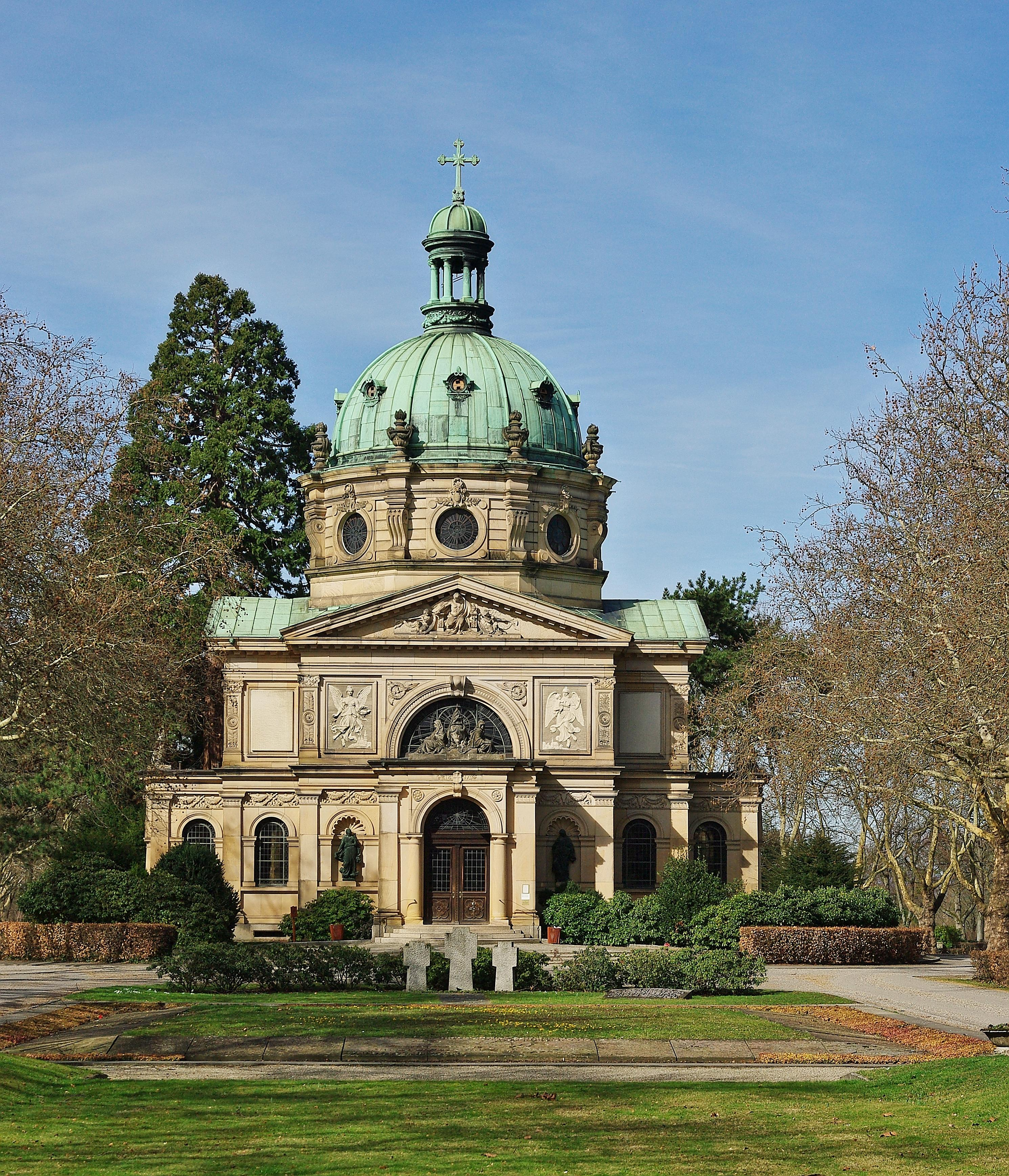 Bilder vom Hauptfriedhof Freiburg, der seit 1872 besteht